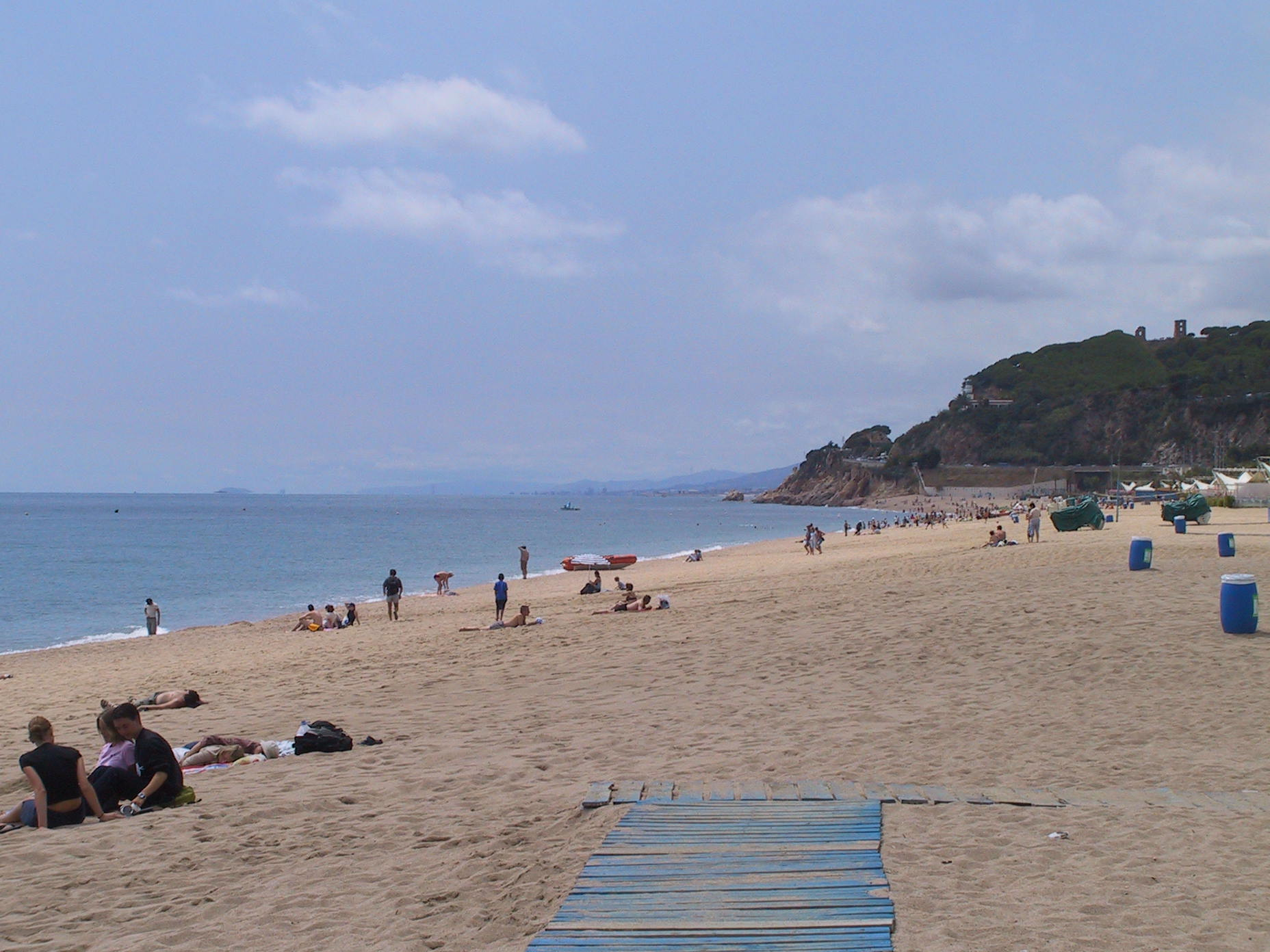 la spiaggia principale di Calella, moiomax